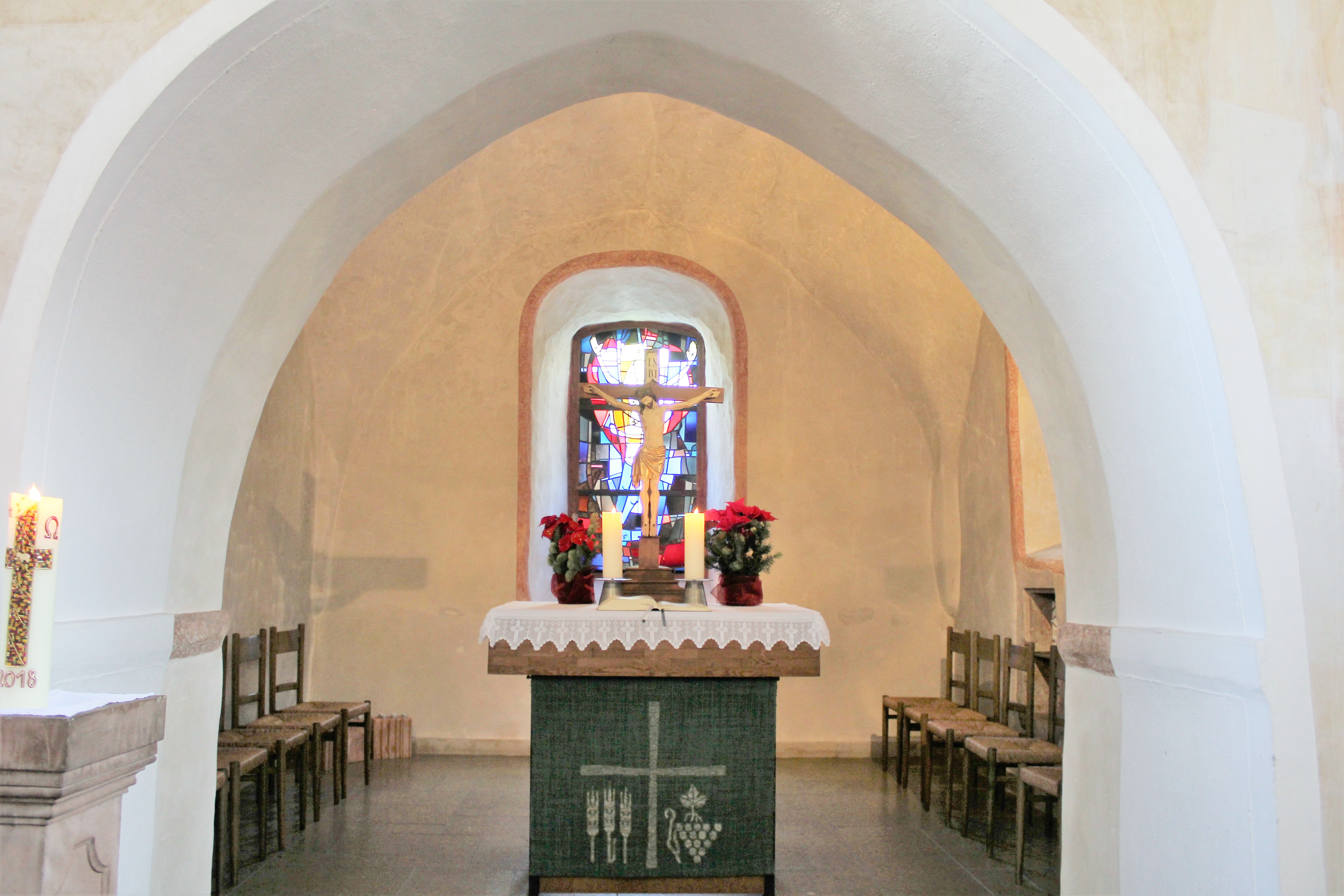 Evangelische Kirche Leidenhofen, Gemeinde Ebsdorfergrund, Landkreis Marburg-Biedenkopf, Hessen, Deutschland